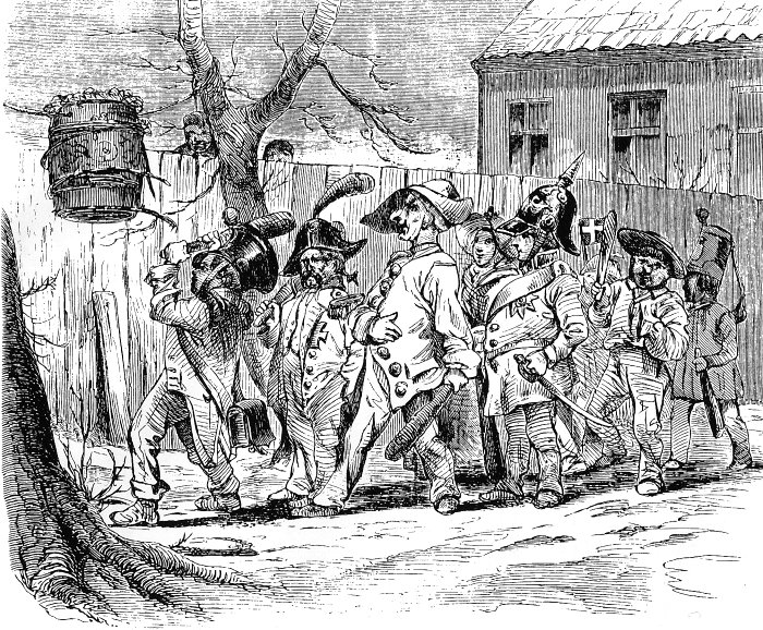 at slå katten af tønden - Fastelavn i Danmark